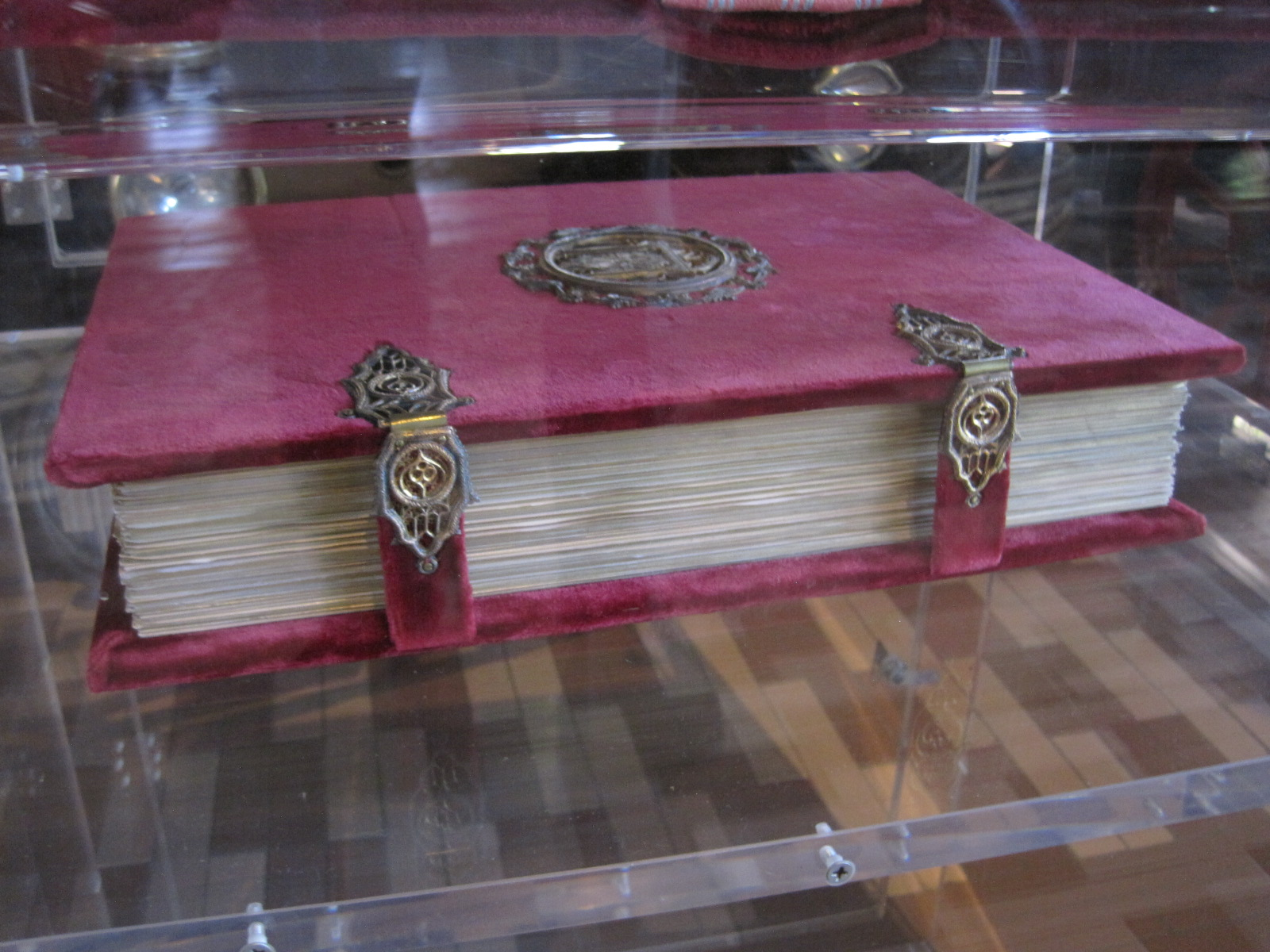 Automobiles in Panini Maserati Museum in Modène - Bible de Borso d'Este